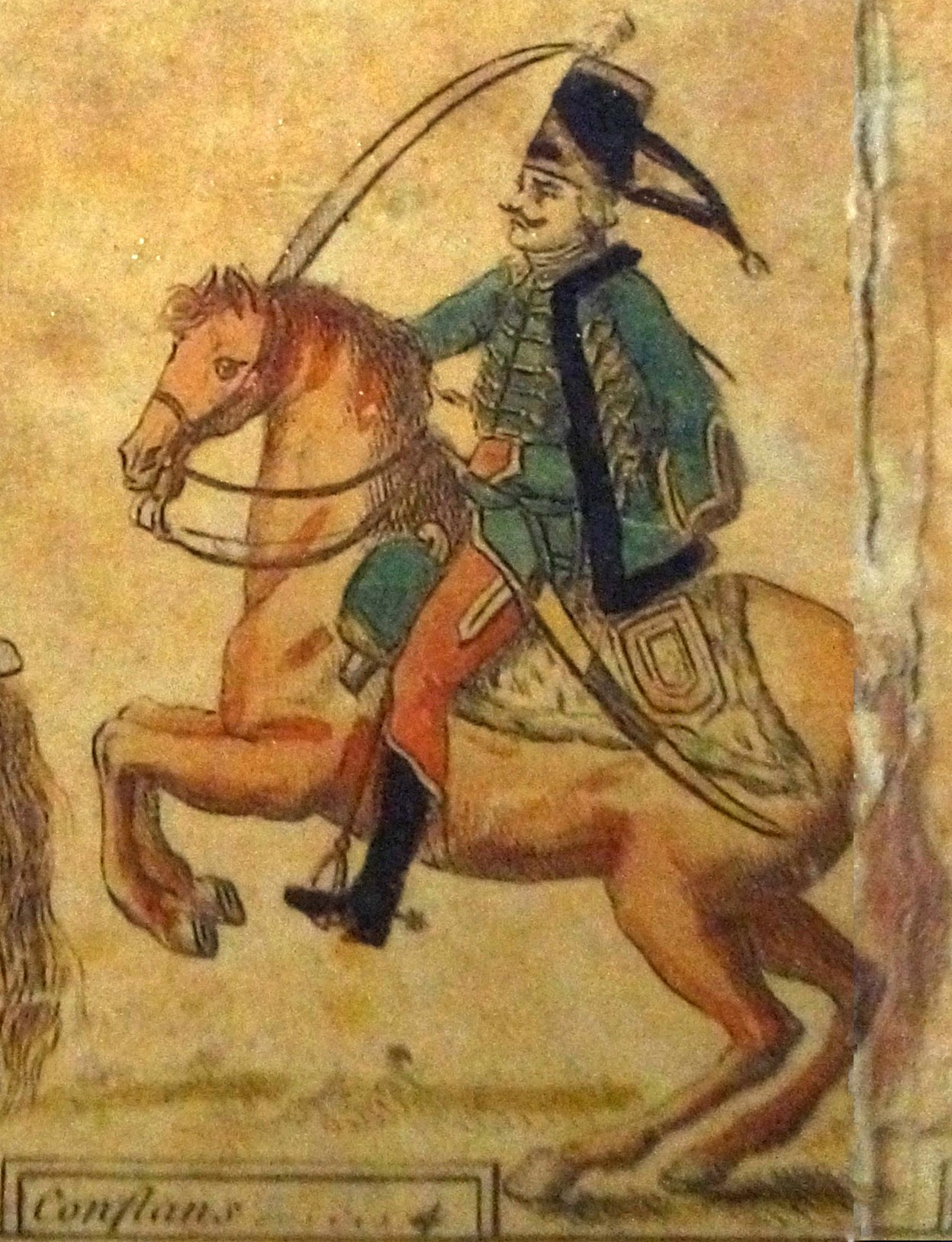 Peinture présentée au musée d el'armée.